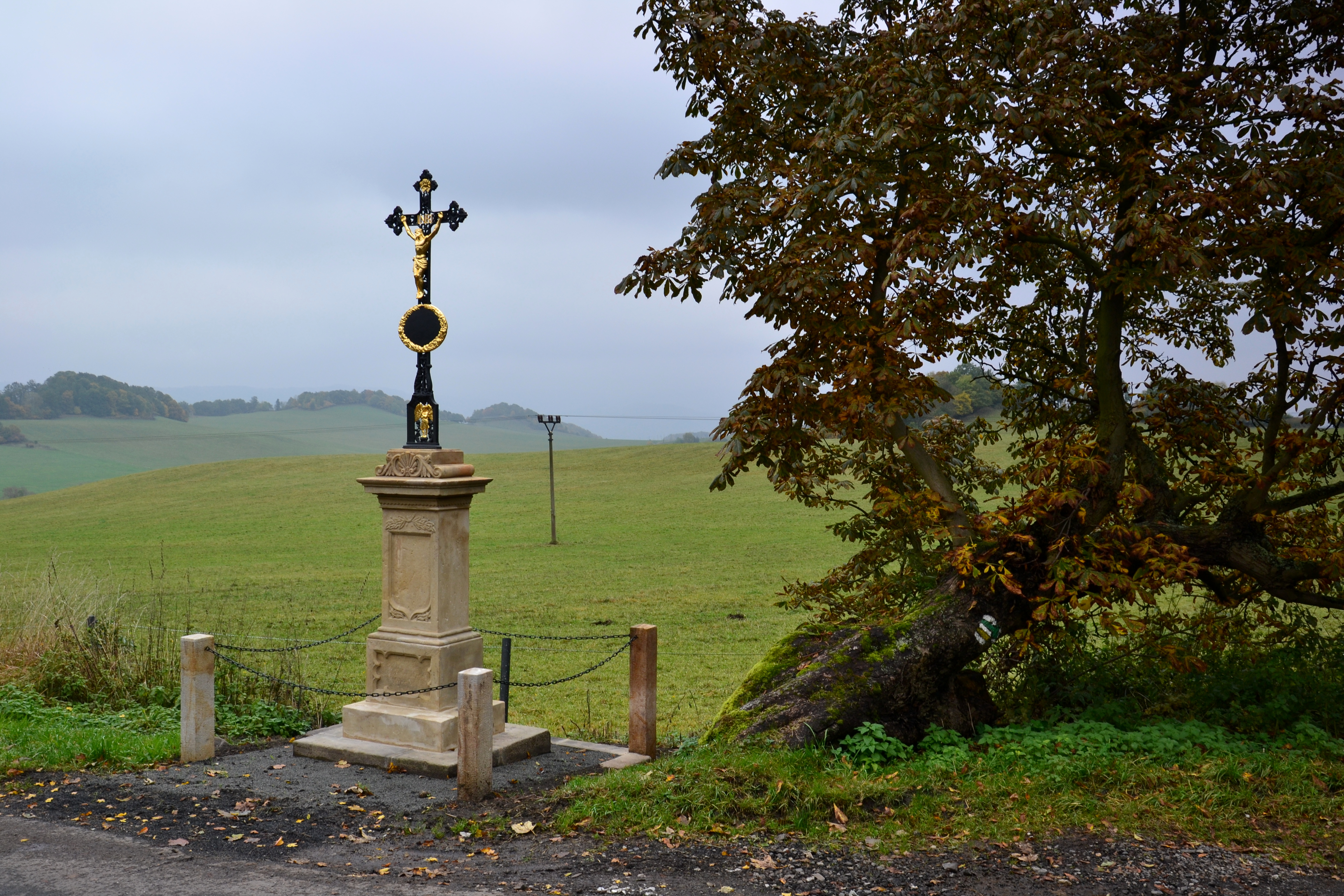 Kříž na východním okraji vesnice